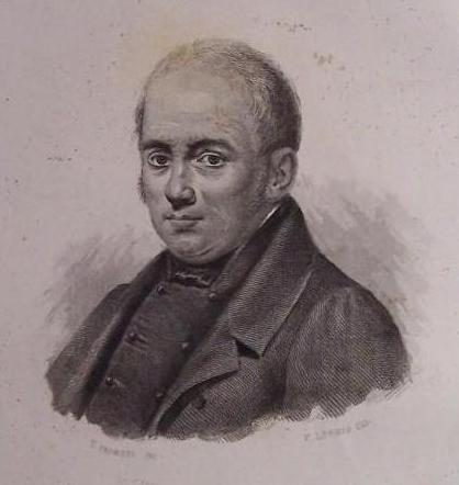 Il patriota Antonio Maria De Luca Pubblicazione: Torino, Stabilimento Fontana, 1851